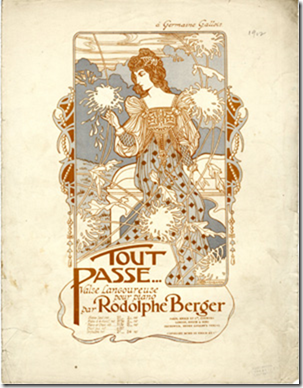 Tout Passe, muziekblad van een melodie van Rodolphe Berger (1864-1916), illustratie door Richard Barabandy (1842-1902)